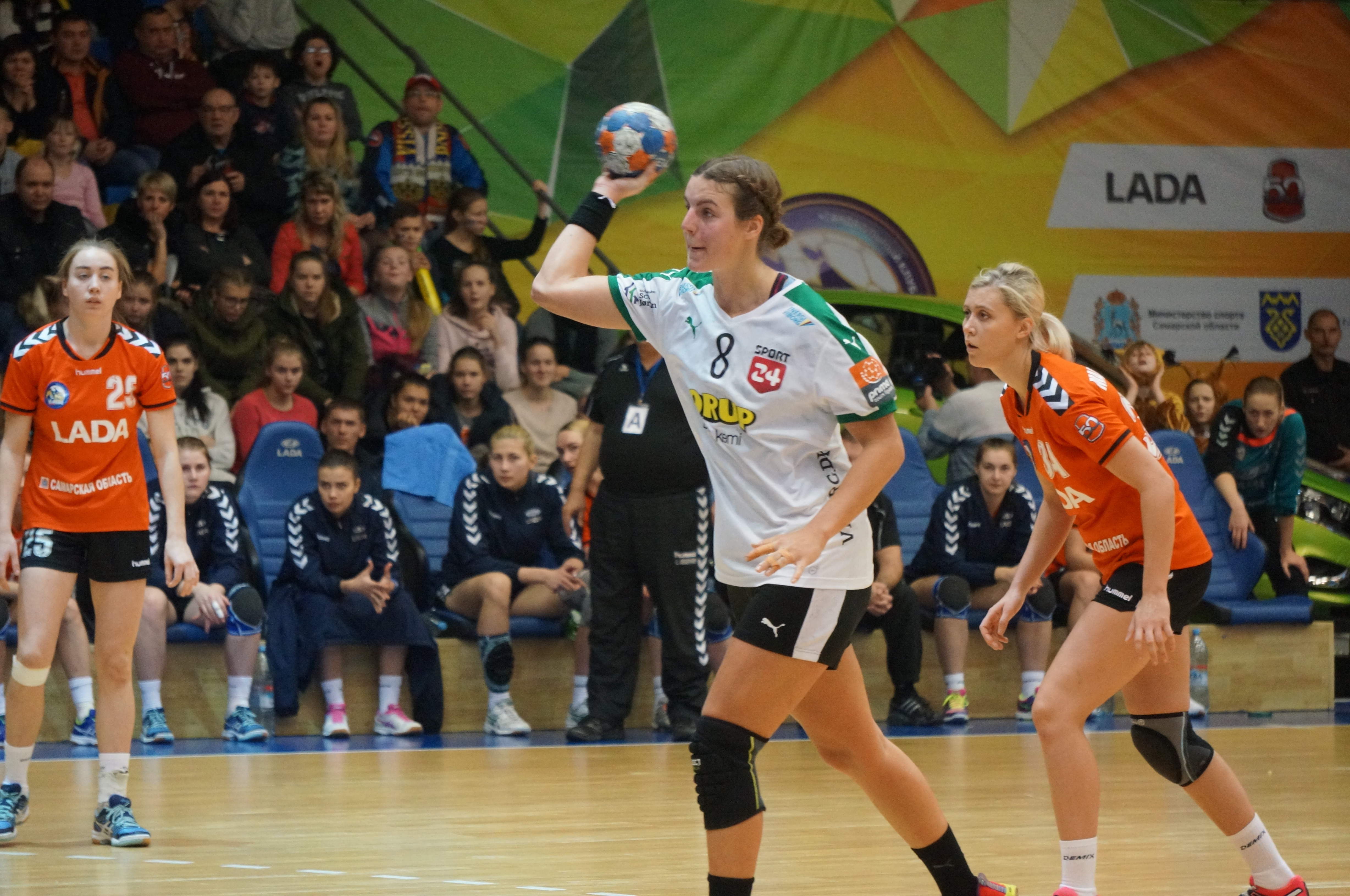 Матч Кубка ЕГФ "Лада" (Тольятти) - "Виборг" (Виборг). Тольятти, Россия, 13 ноября 2016. Семиметровый пробивает Карин Стрёмберг (№8). Рядом игроки "Лады" Ольга Щербак (№ 25) и Елизавета Малашенко (№34)